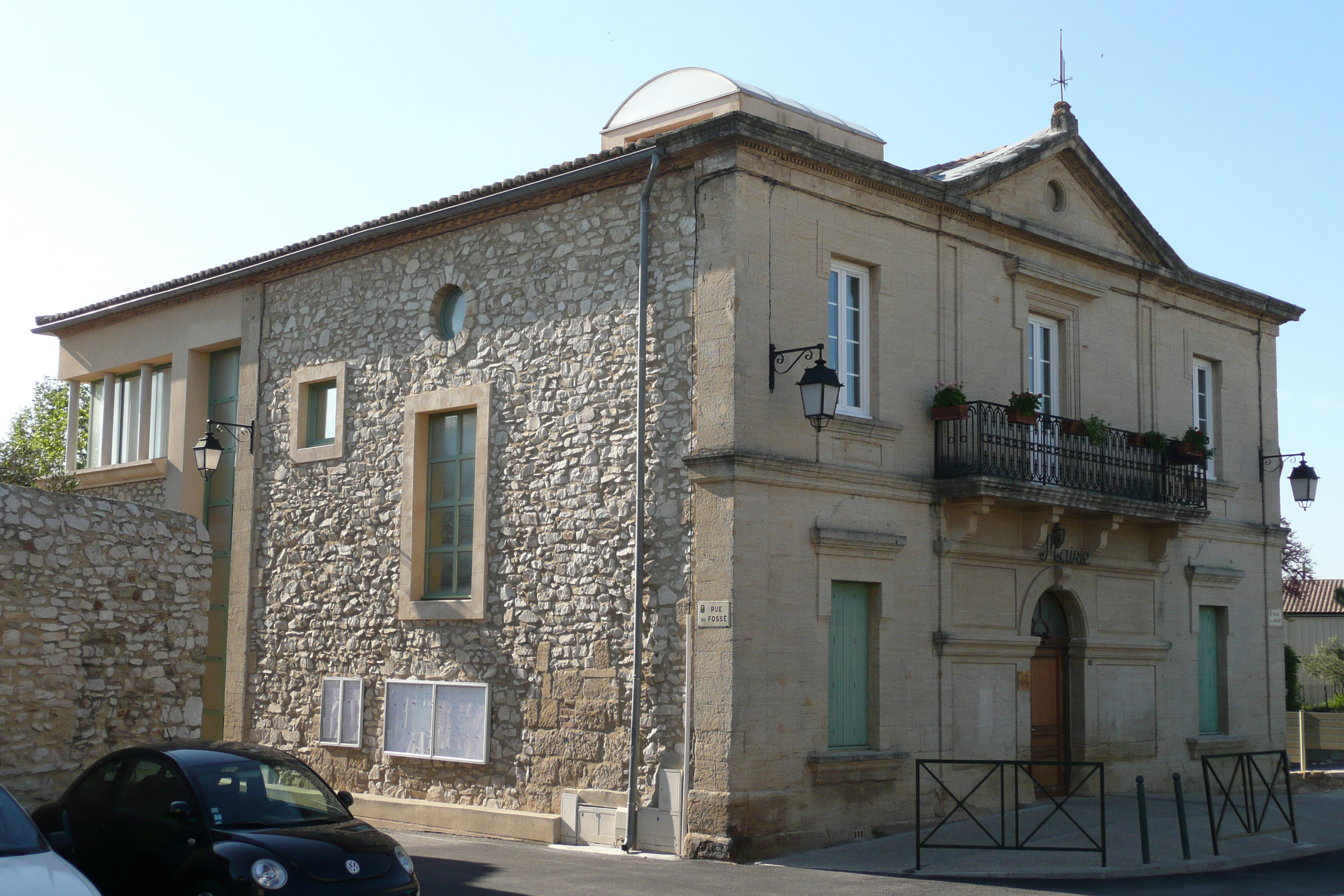 Mairie à Saint-Laurent-des-Arbres.